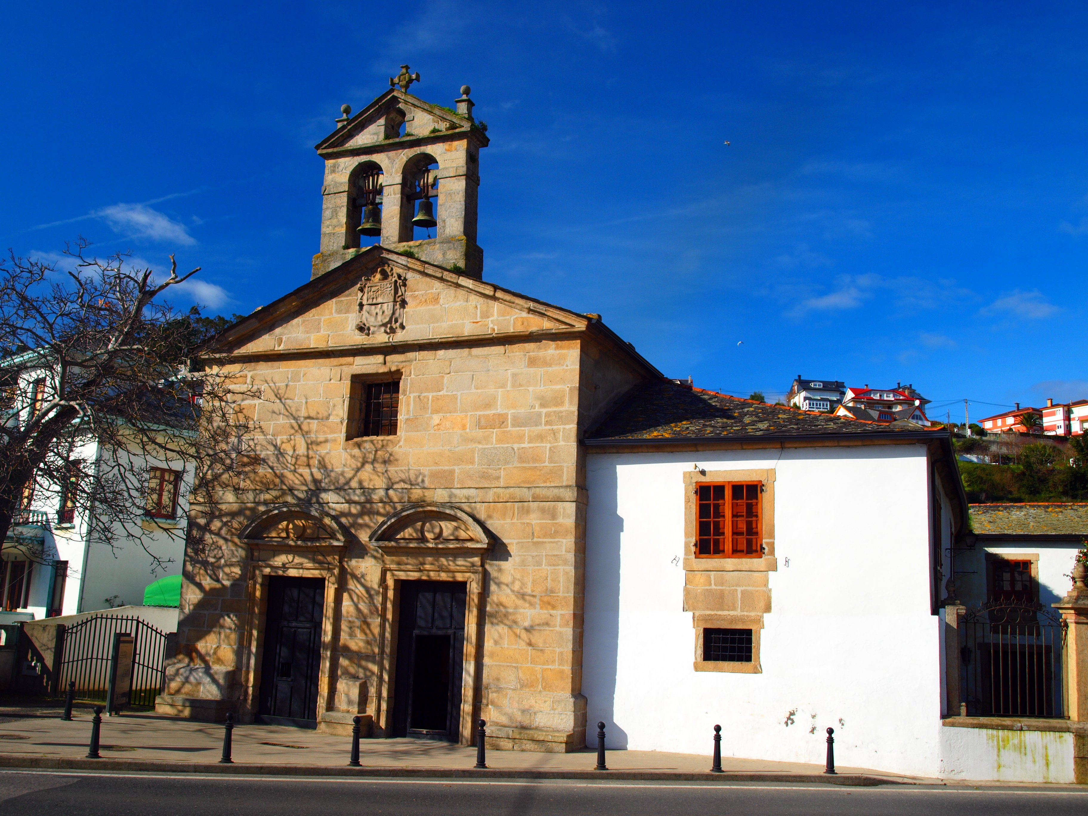 Exterior de la Capilla de la Misericordia. Foto tomada con Olympus E-450 + Zuiko 14-42.